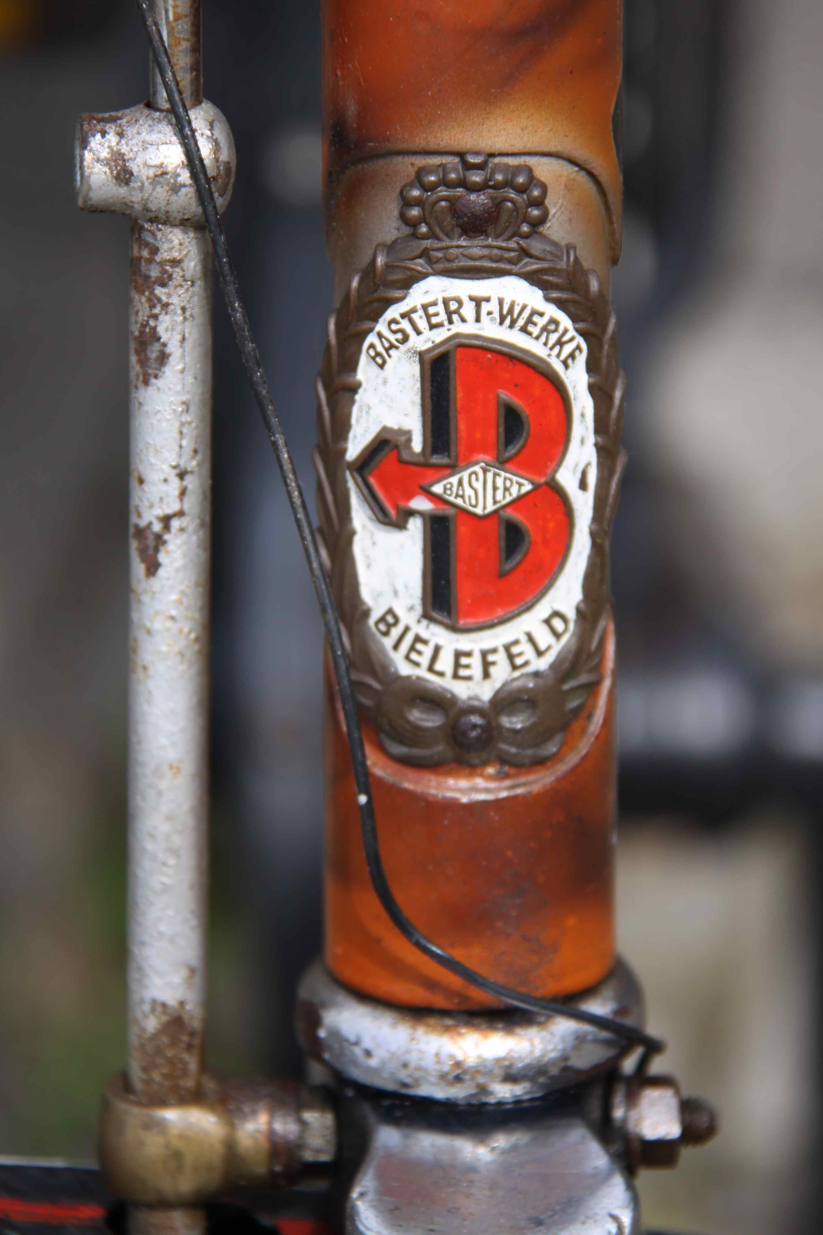 Bastert Firmenkennzeichen